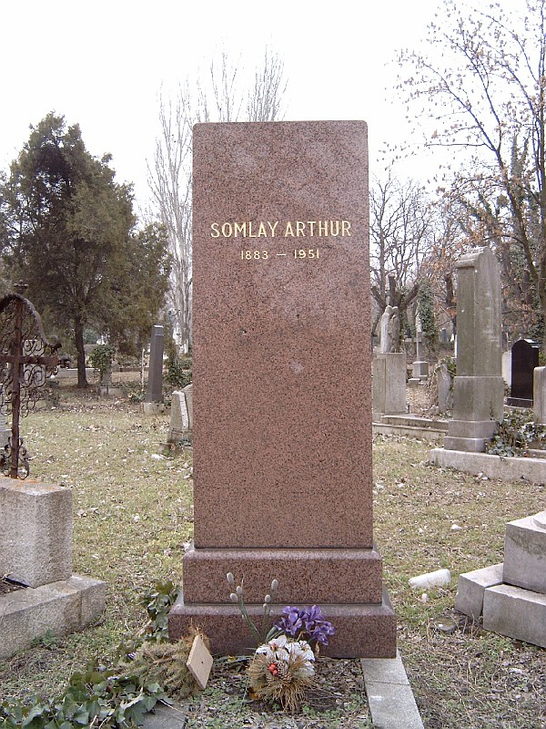 Somlay Artúr, Schneider (Bp., 1883. febr. 28. – Bp., 1951. nov. 10.) Kossuth- díjas színész sírja Budapesten. Kerepesi temető: 33-1-50/a.